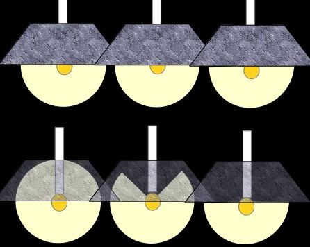 Abstrahlwinkel und Leuchten